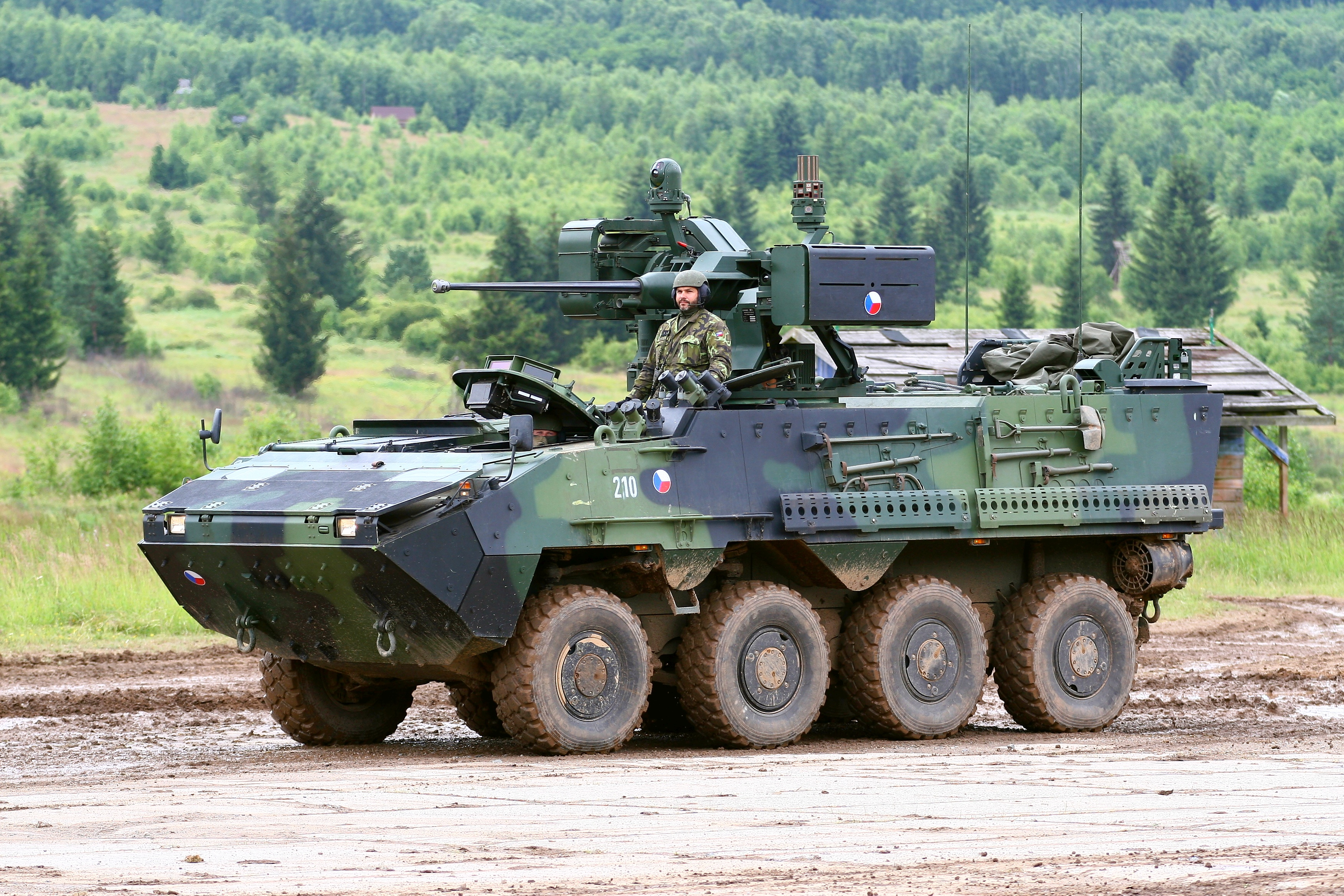 Vojenská technika zaznamenaná při dynamických ukázkách na Dni pozemního vojska BAHNA 2018, který pořádá Velitel společných sil a Nadace pozemního vojska AČR.